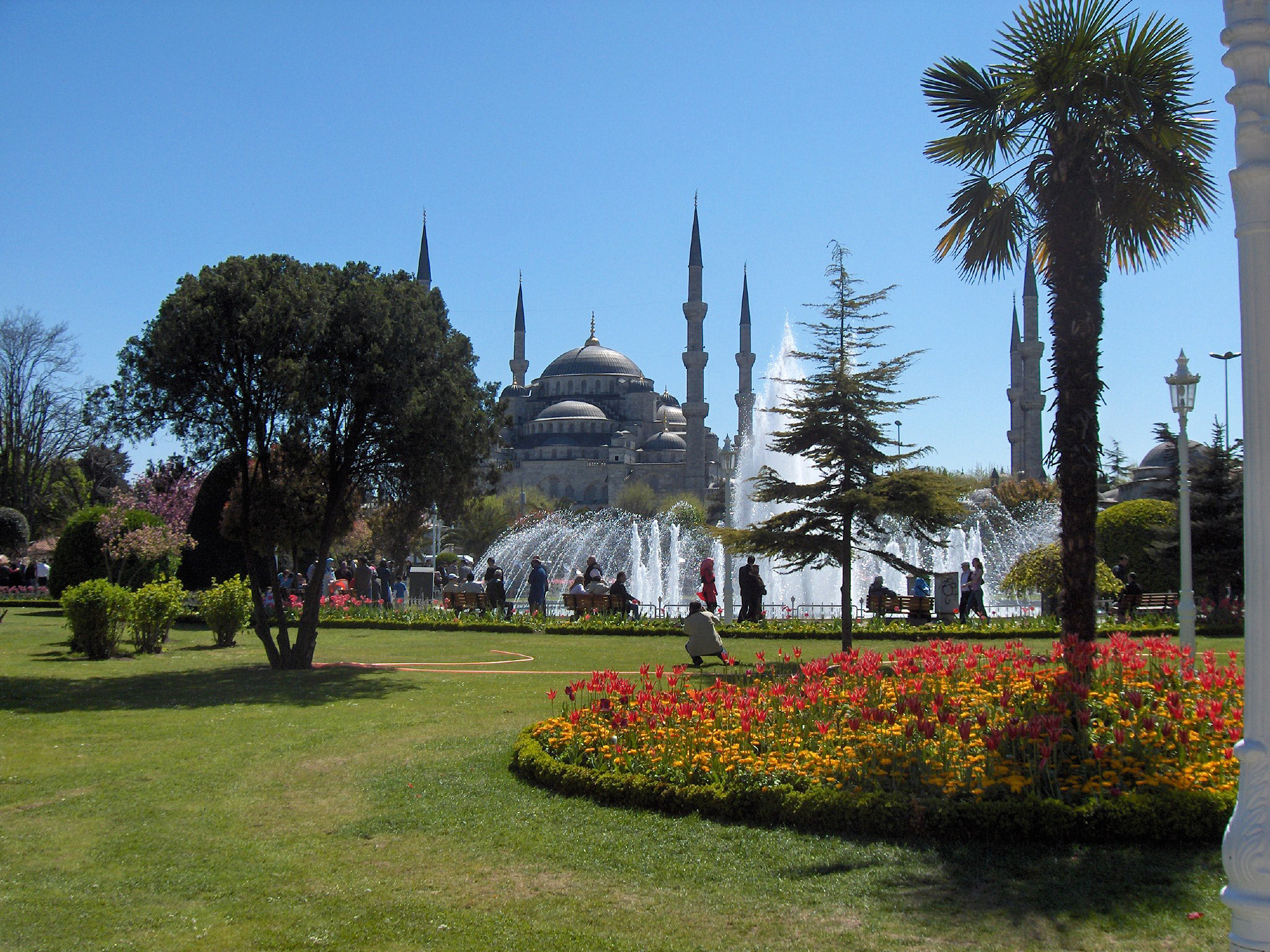 Sultan Ahmed mosque (Blue mosque); Istanbul, Turkey